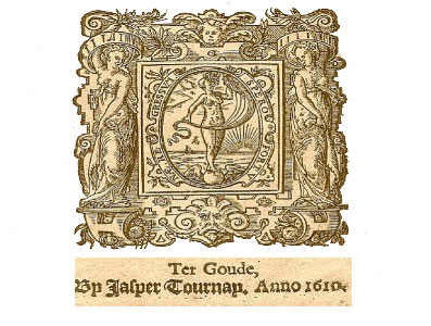 Drukkersmerk van Jasper Tournay (±1561-1635)